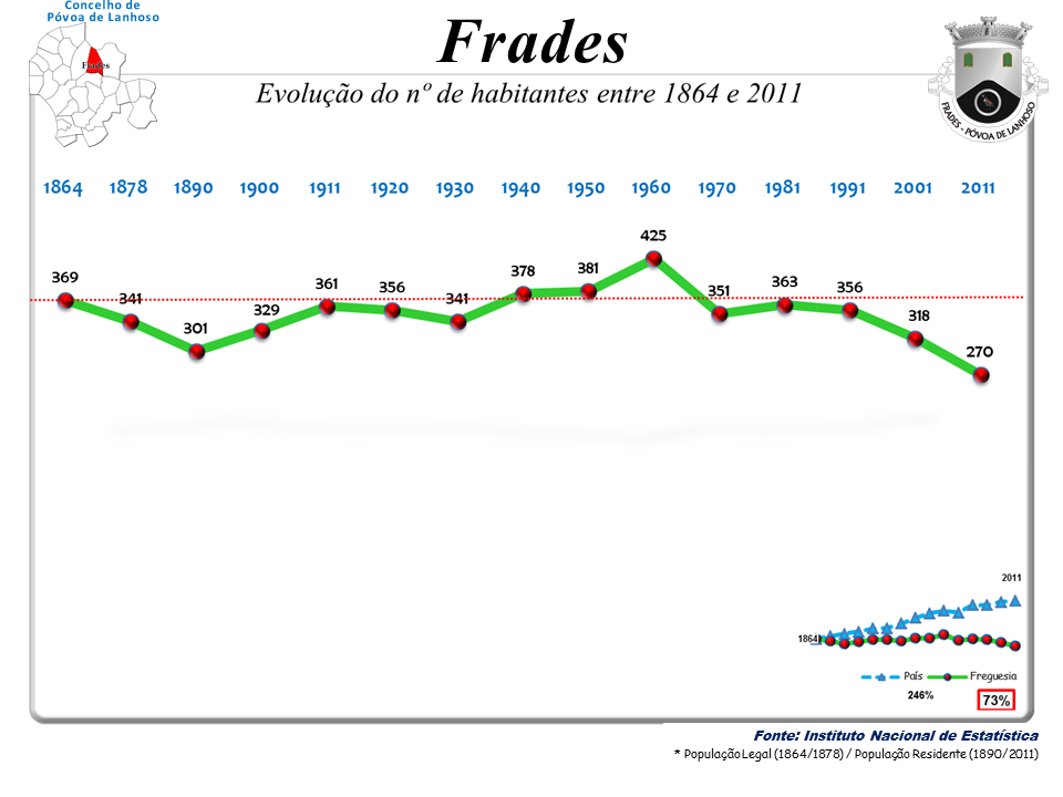 Censos 1864/2011